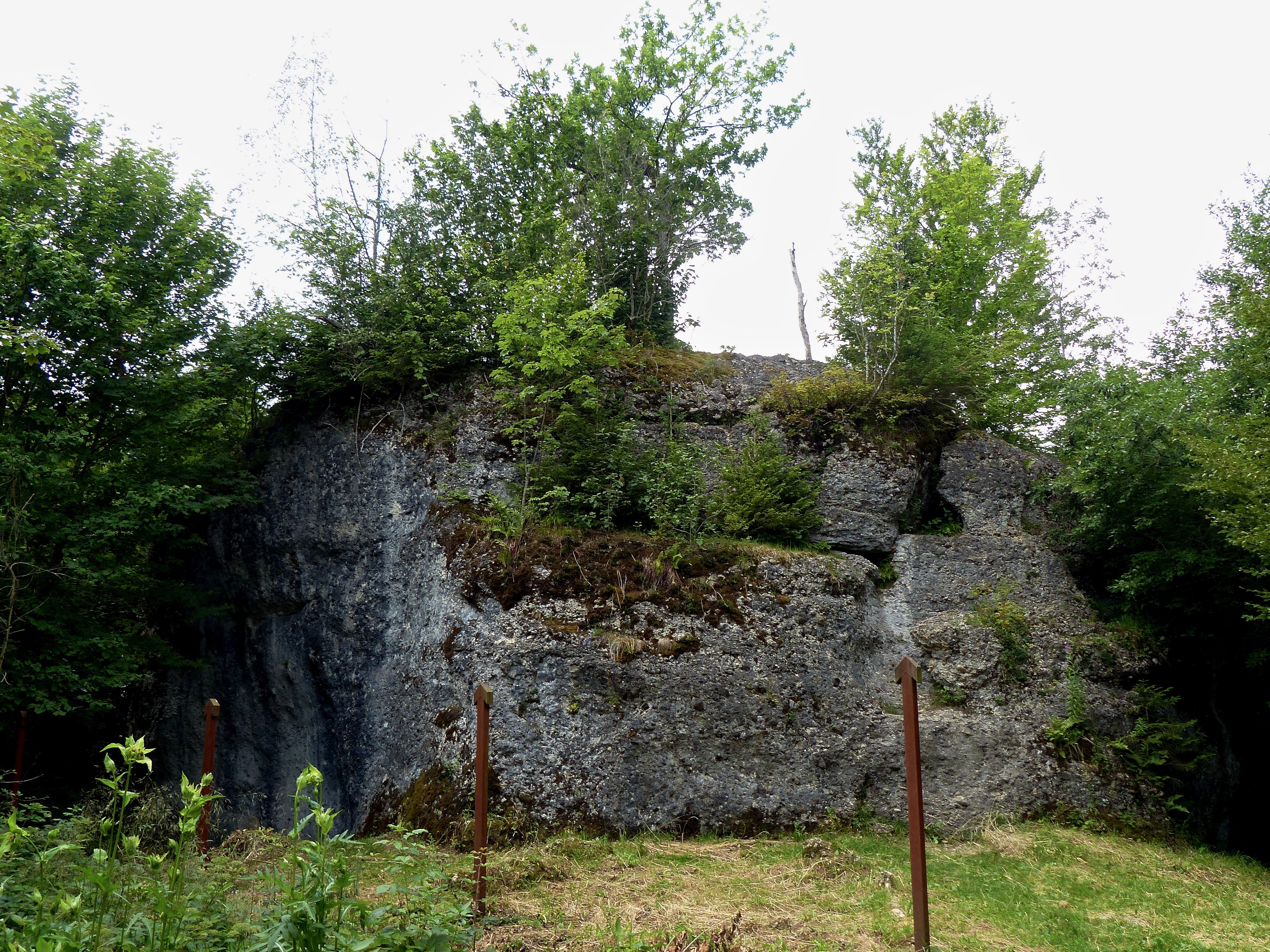 Geotop Dengelstein: Findling im Kemptener Wald (Konglomerat / Untere Kojenschichten (untere Süßwassermolasse))